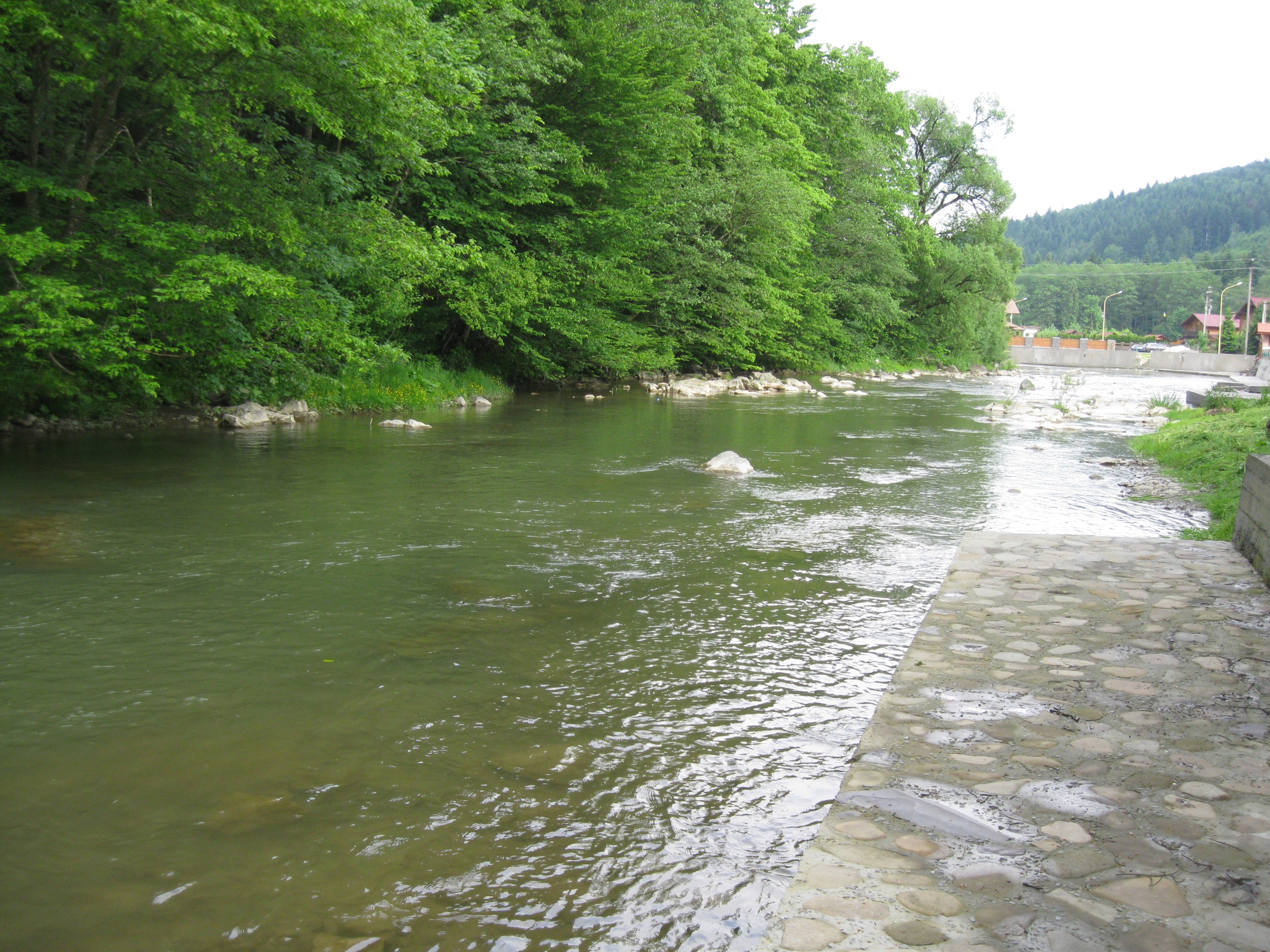 Селище Жденієво. Річка Жденівка, права притока Латориці.